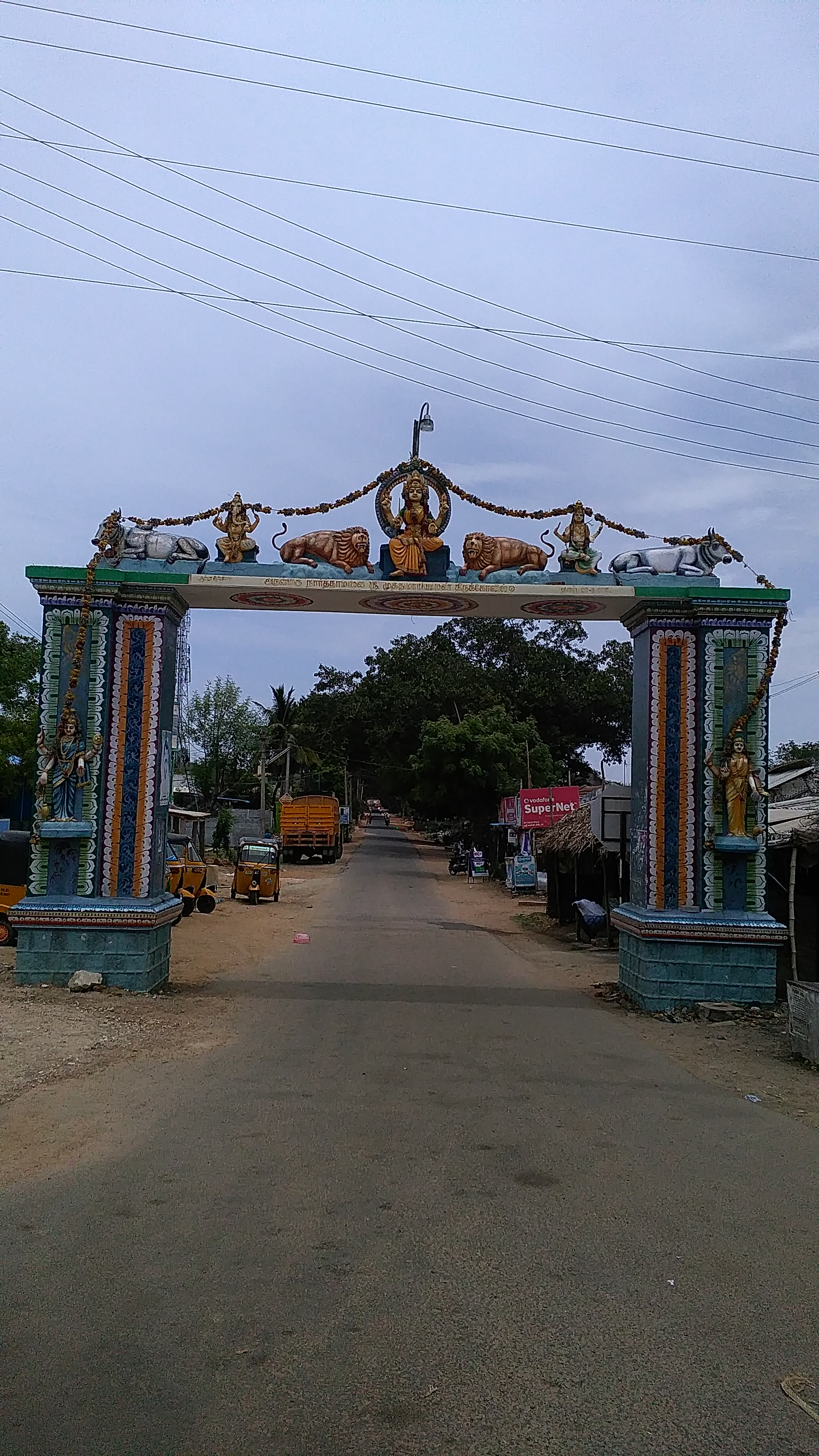 நார்த்தாமலை கோயிலுக்குச் செல்லும் நுழைவுவாயில், பொம்மாடிமலை.